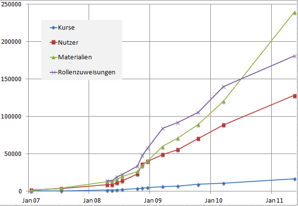 BayernMoodle Initiative der Ministerialbeauftragten für die Gymnasien in Bayern seit 2006 - Statistik: 2007 - 2012